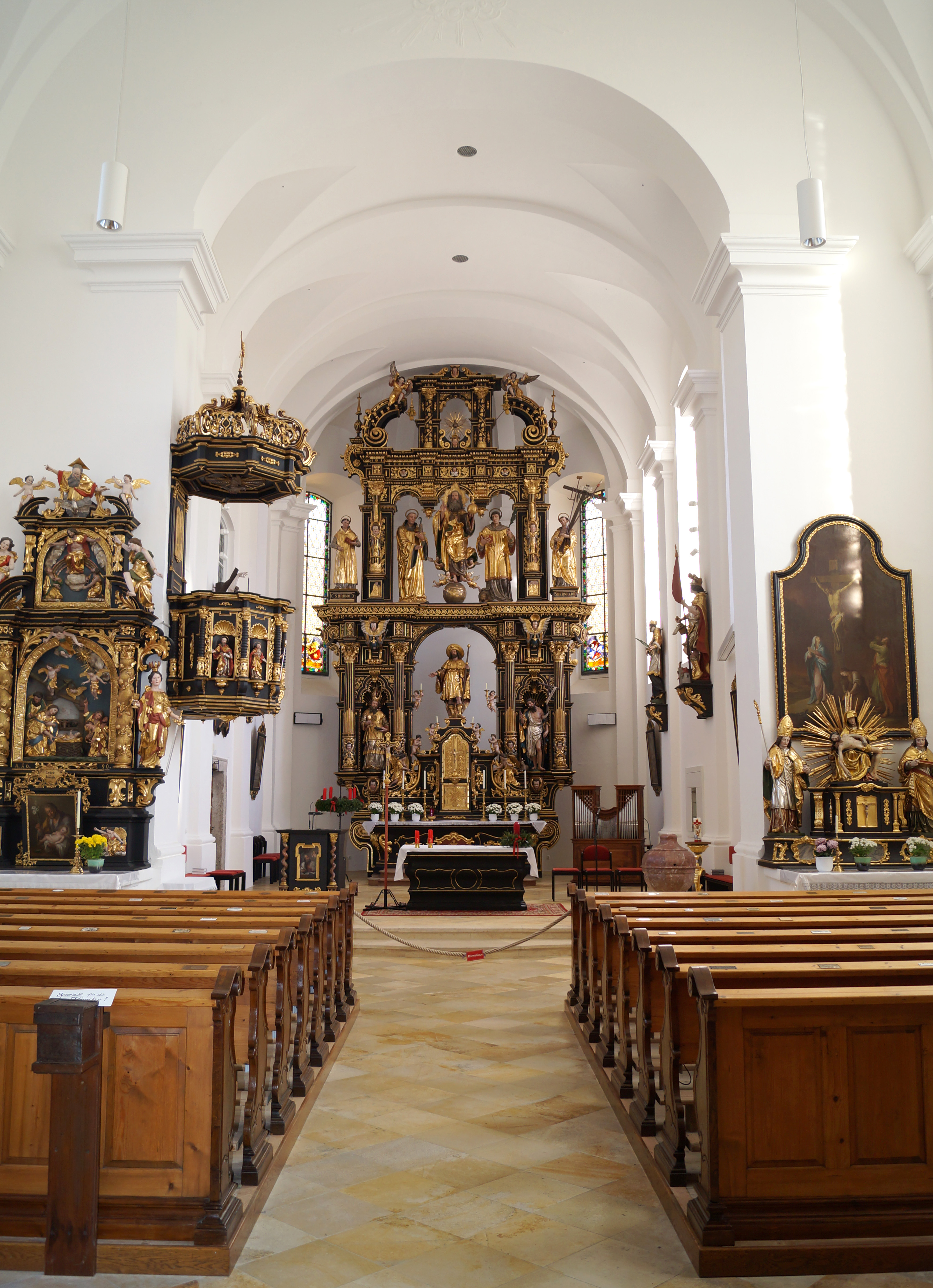 Hochaltar Pfarrkirche Grünau im Almtal, Renovierung Jan. bis Okt. 2013, Neueröffnung am 6. Oktober 2013